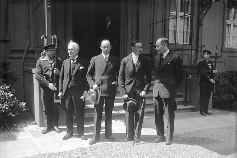 Die erfolgreichen Nordpolflieger Wilkins und Eyelson beim Reichspräsidenten von Hindenburg! Die erfolgreichen Nordpolflieger nach dem Verlassen des Palais von links nach rechts: der amerikanische Botschafter in Berlin Schurman, Hauptmann Wilkins, ein Vertreter der englischen Botschaft , Leutnant Eyelson.